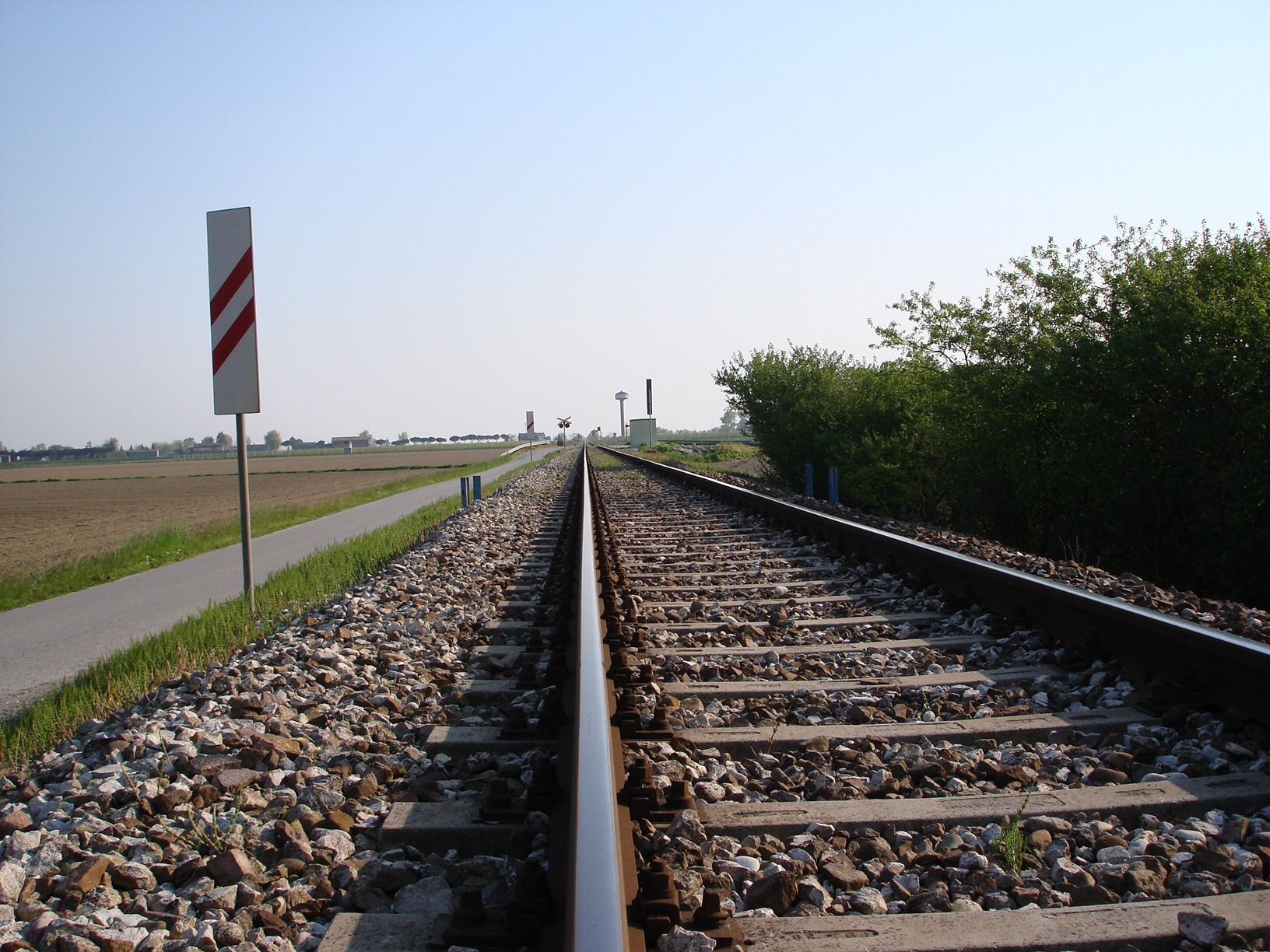 la Ferrovia Adria-Mestre nei pressi di Cavarzere (località Baggiolina) in direzione ADRIA